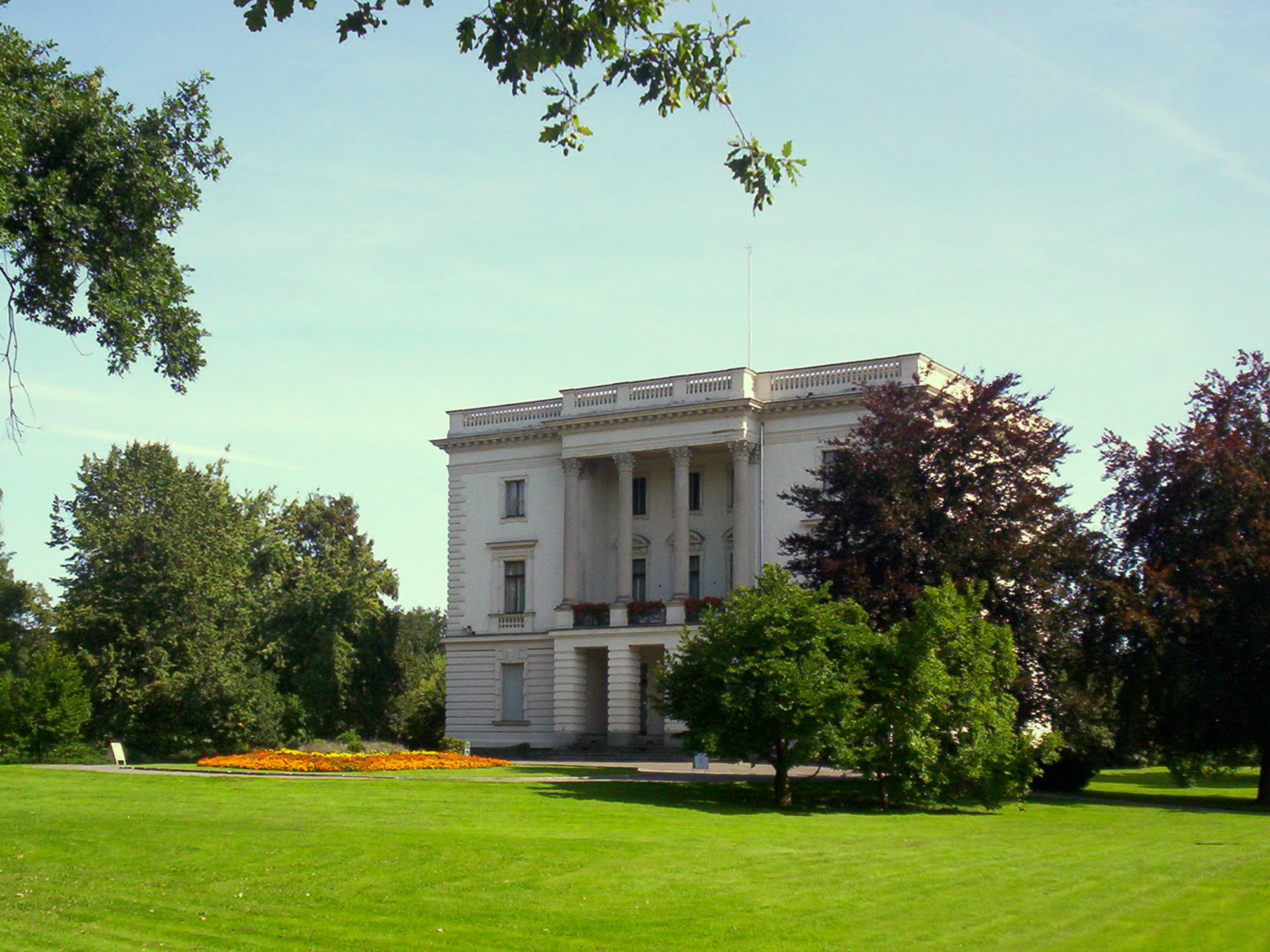 "Weißes Haus" in Markkleeberg, Sachsen.